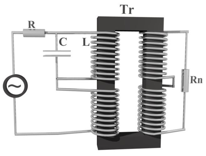 Параллельно-последовательный резонанс на трансформаторе